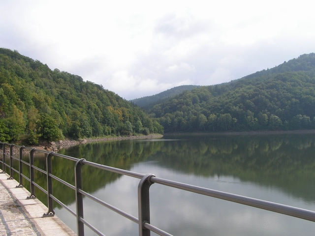 Jezioro Bystrzyckie niedaleko Zagórza Śląskiego. Widok z tamy spiętrzającej wody tego sztucznie stworzonego jeziora. Autor: Wojciech "Spook" Sura.